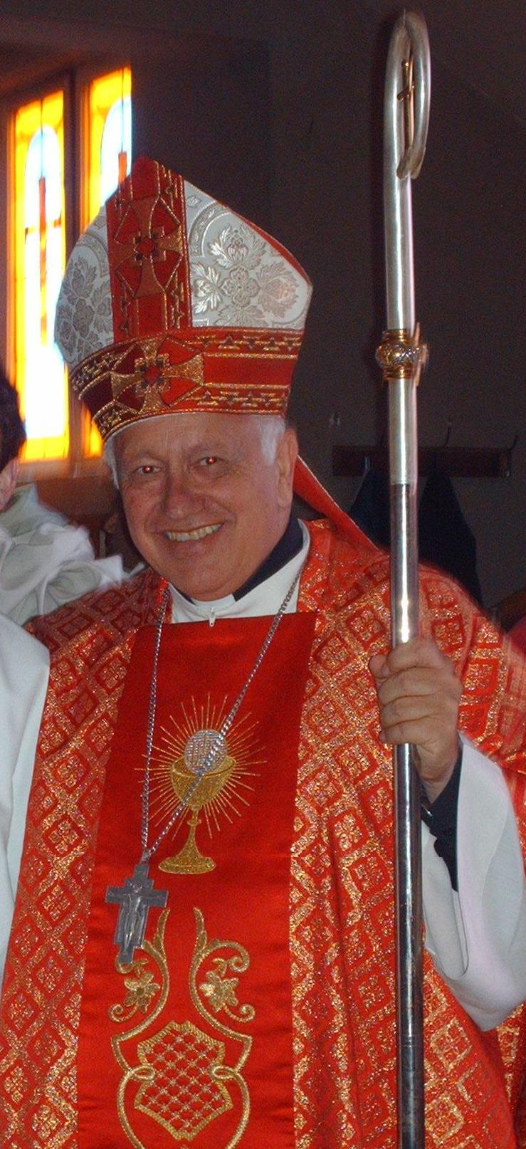 Fotografía del obispo Ricardo Ezzati en la sacristía del templo parroquial de San Sebastián de Yumbel, posteriormente a la misa de cierre de la peregrinación a yumbel del 11 de octubre de 2008 con el fin de ganar indulgencia con motivo del año paulino.